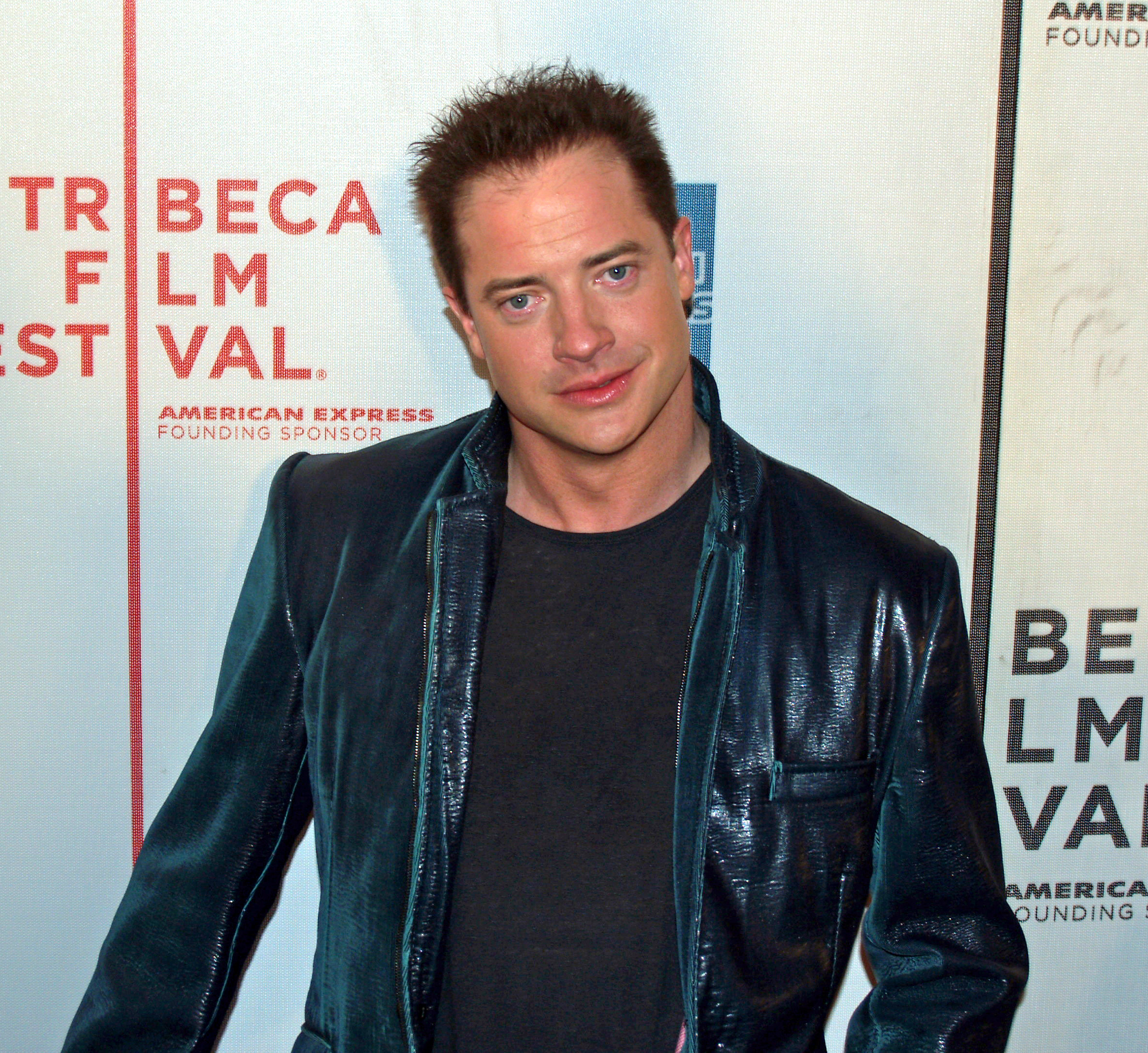 Brendan Fraser by David Shankbone